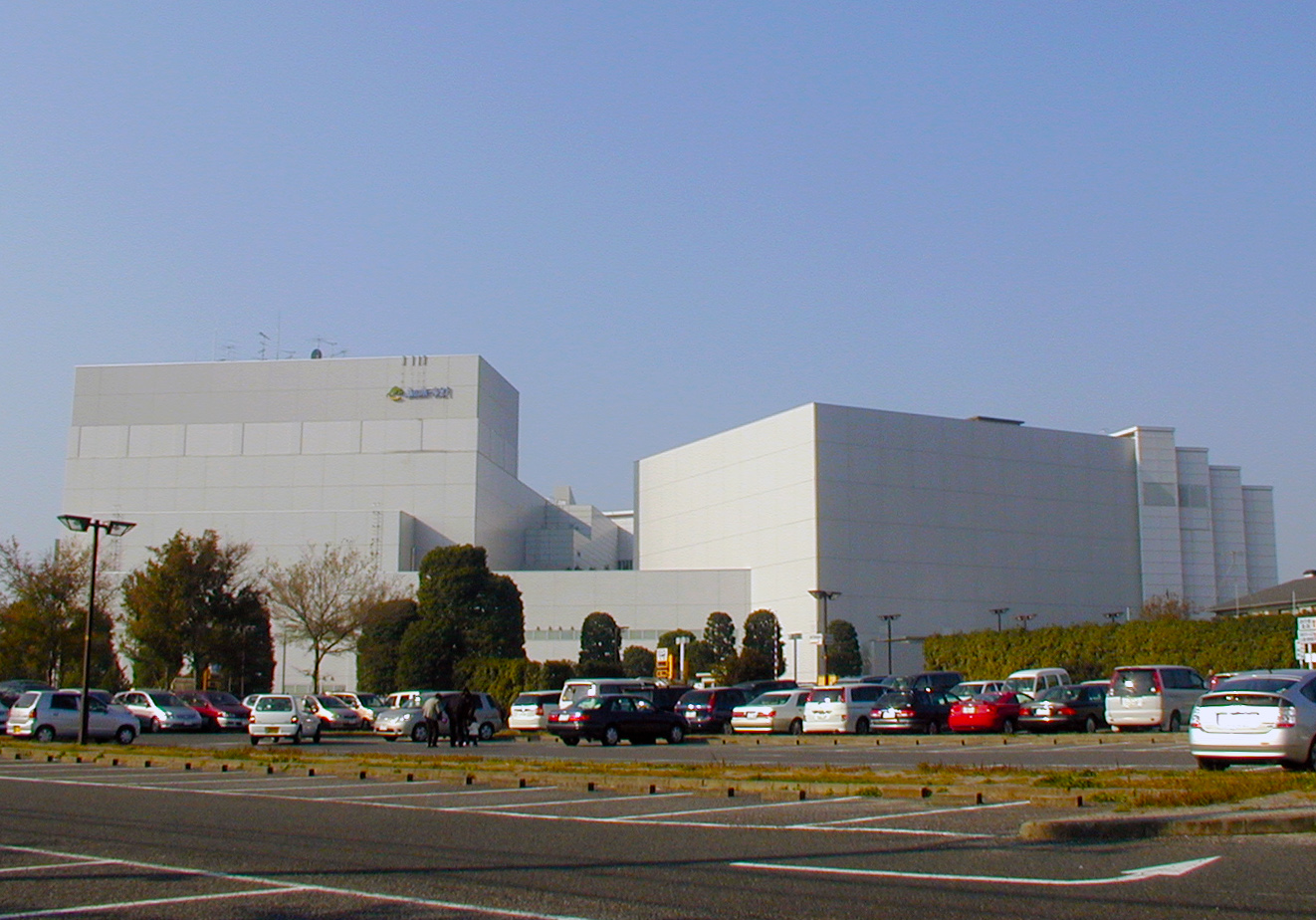 Mori-no-hall_21, Matsudo, Chiba, Japan